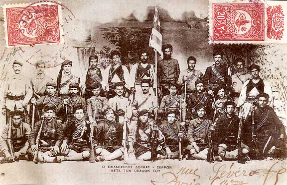 Четата на капитан Дукас Дукас.